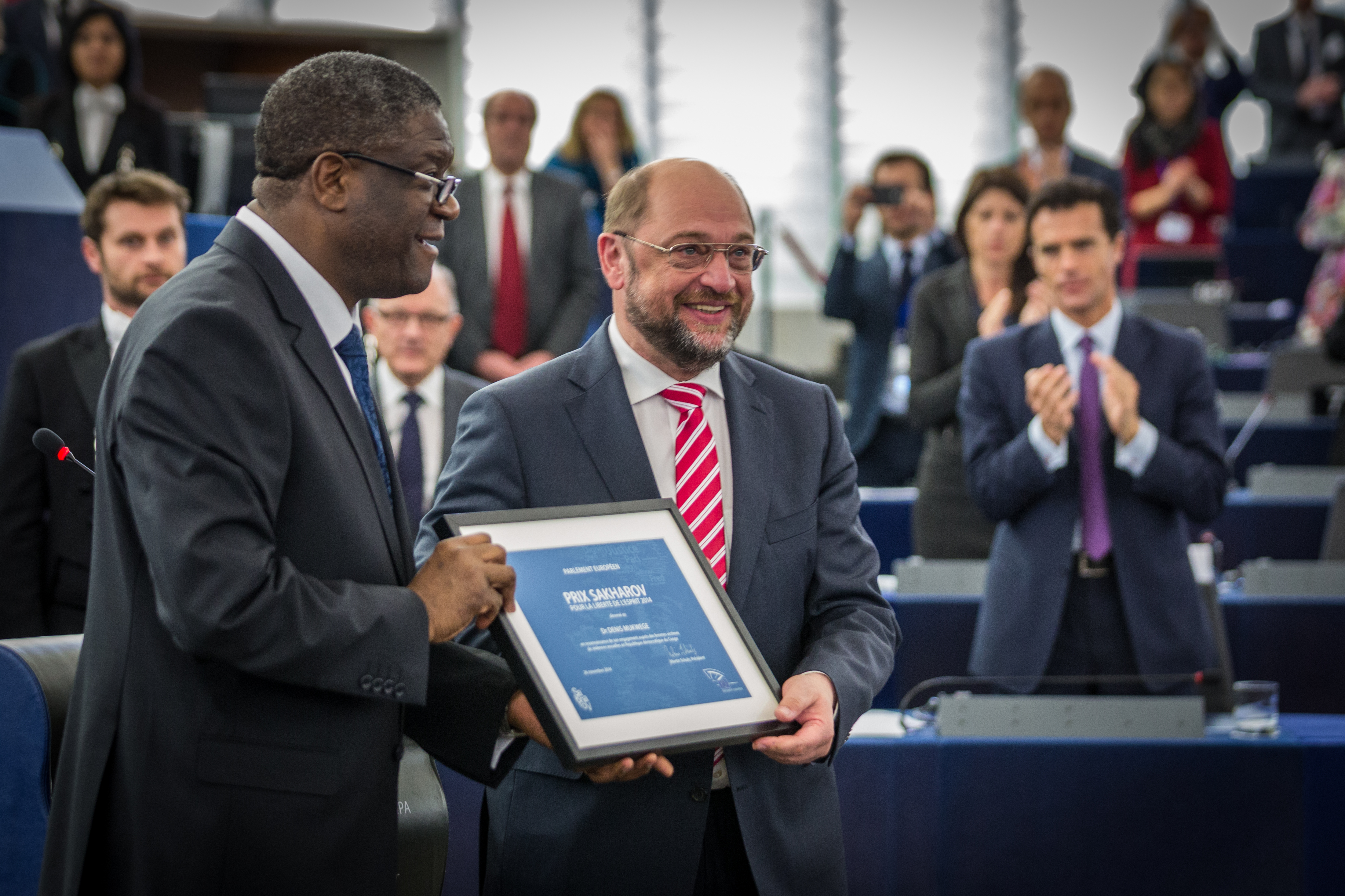 Remise du prix Sakharov 2014 à Denis Mukwege au Parlement européen, Strasbourg 26 novembre 2014